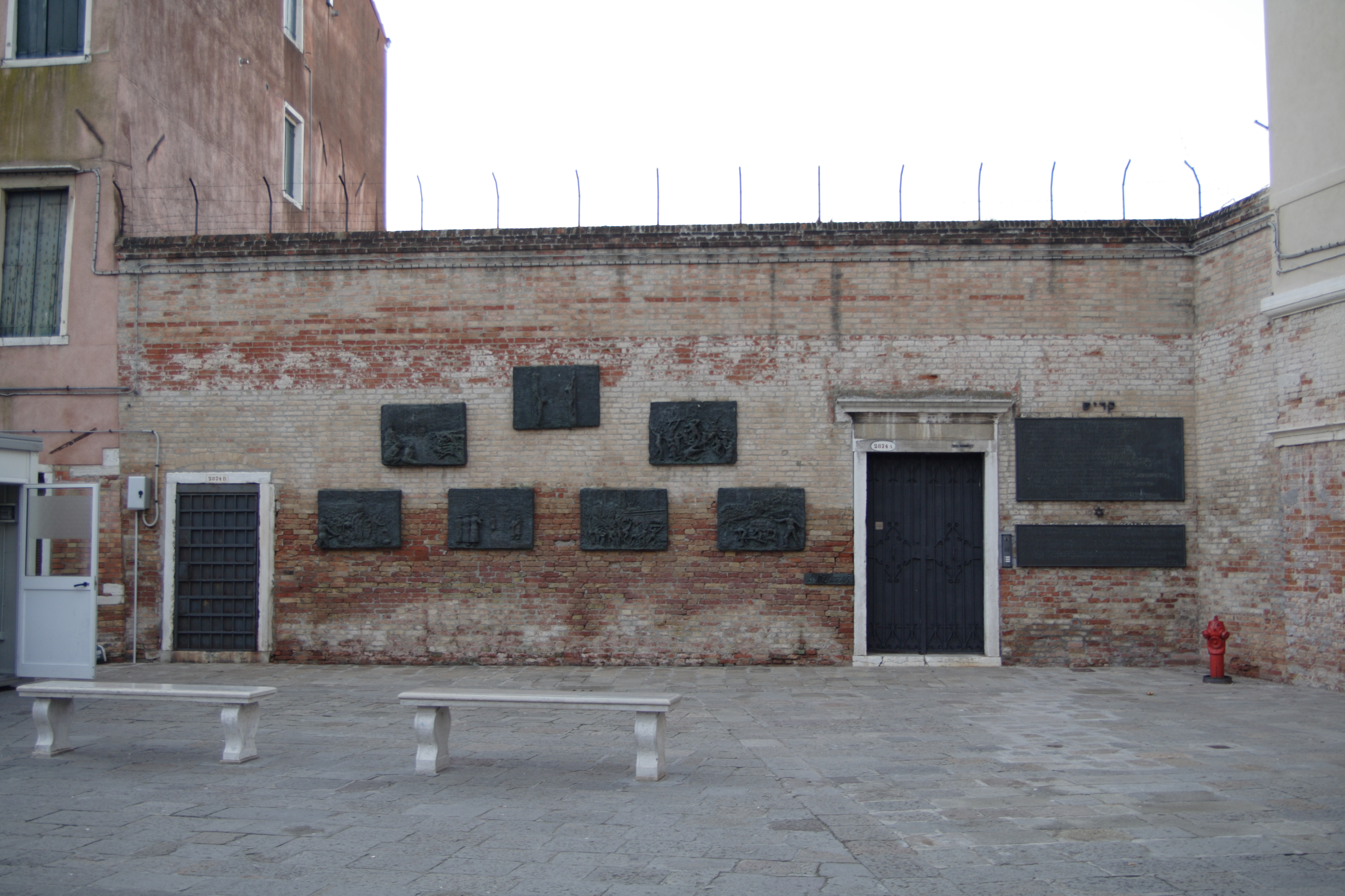 Holocaust Monument, Ghetto, Venice